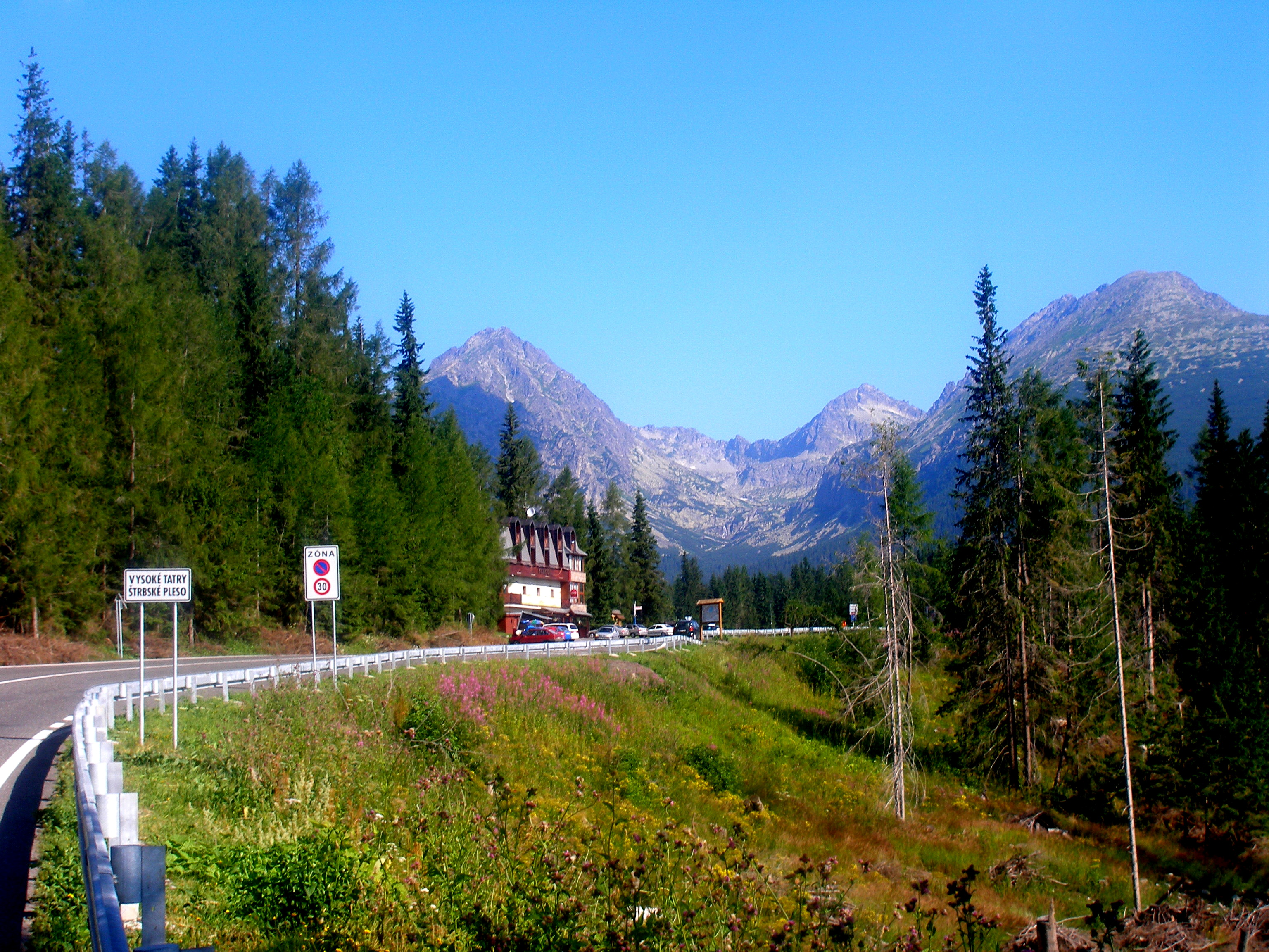 Osada Štrbské Pleso